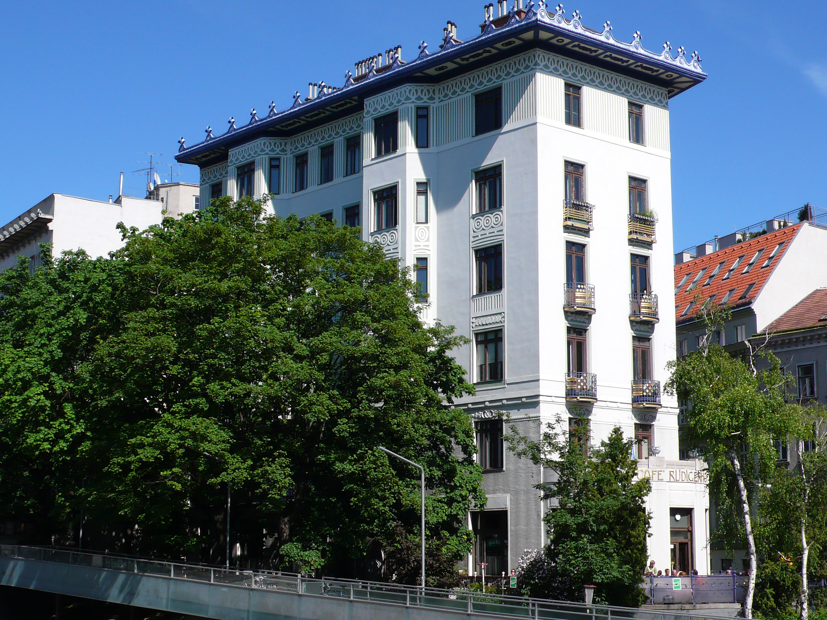 Rüdigerhof, Wien 5., Hamburgerstr. 20, Jugendstilbau von Oskar Marmorek, 1902